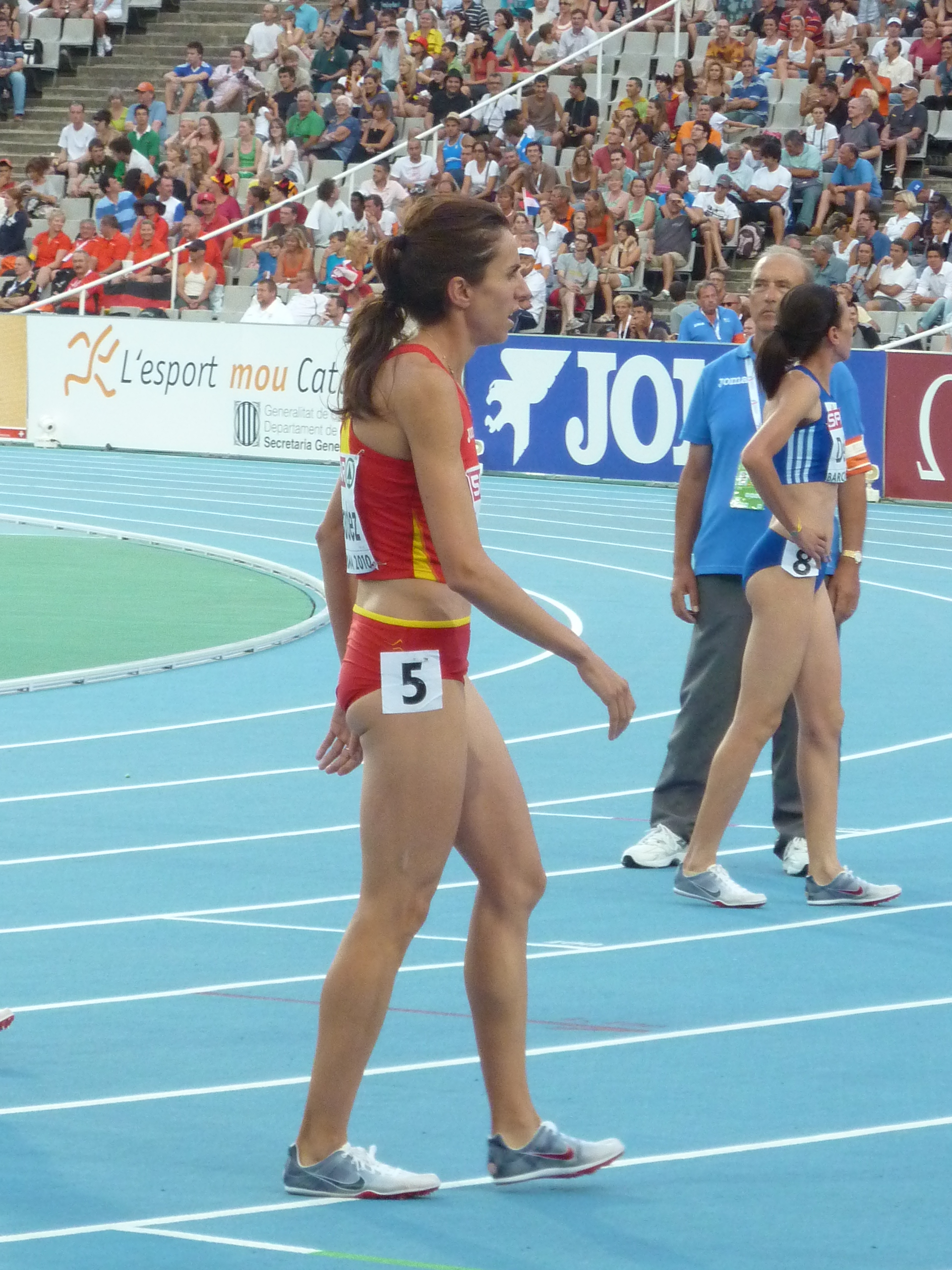 Núria Fernández